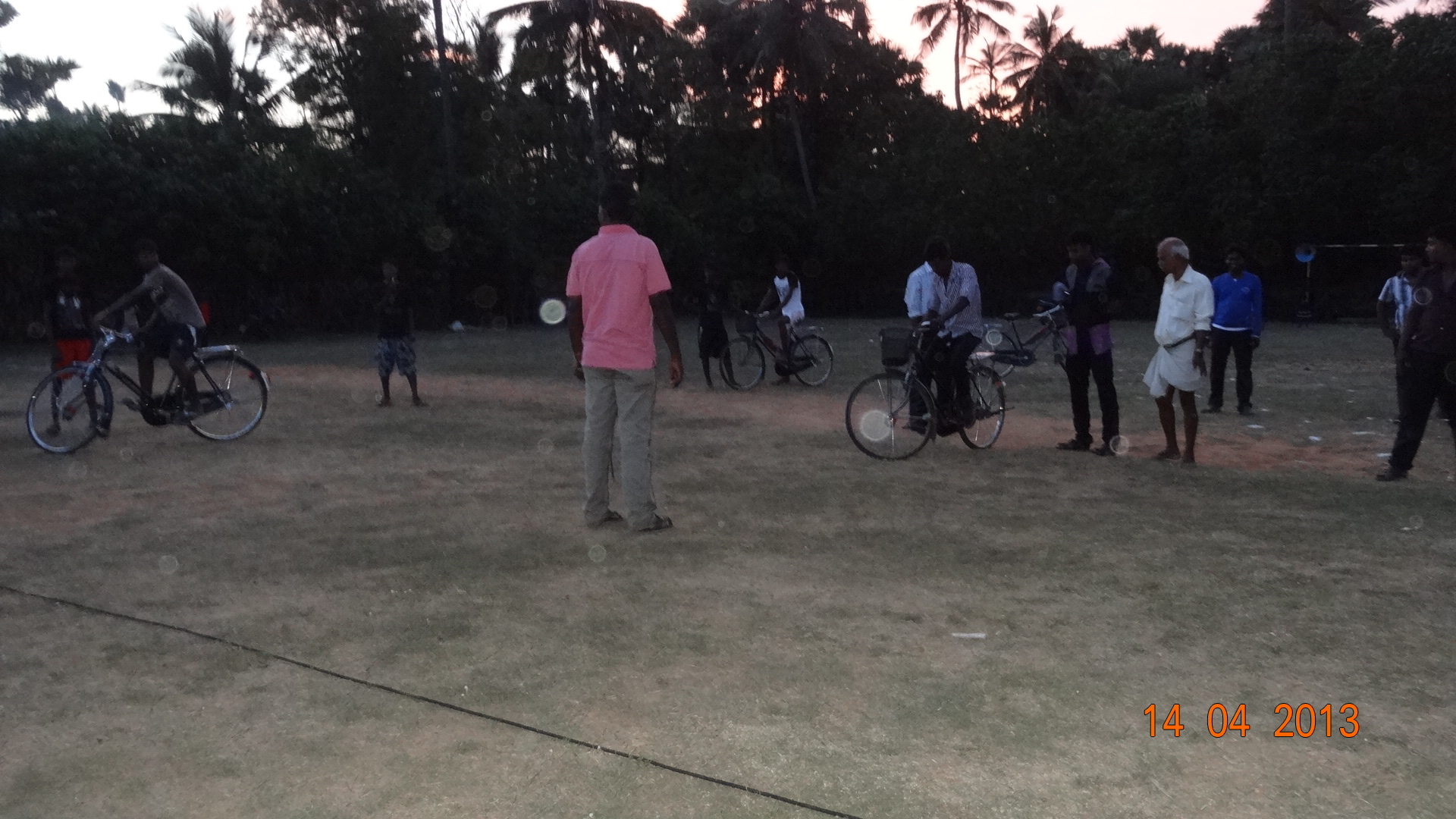 ஆறுதல் சைக்கிள் ஓட்டம்